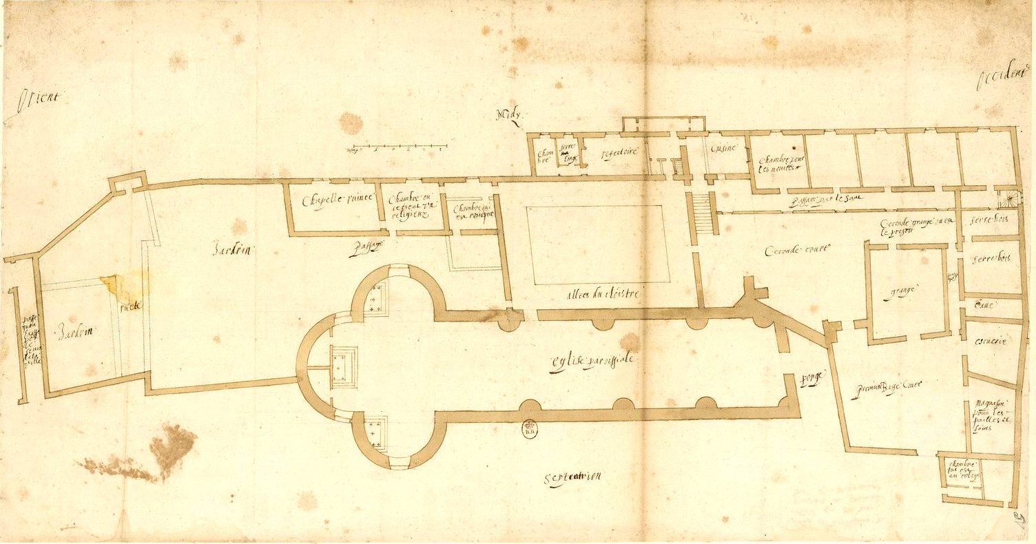 Plan de l'église et du monastère réalisé par les Jésuites (BnF, Estampes et Photographies, FOL-HD-4(8), 1615, Vallery-Radot. Recueil contenant tous les Plans originaux des Maisons, Eglises qui appartenoient à la Société des Jésuites avant leur abolition. [Assistance de France]. Tome VIII.